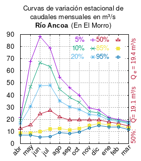 Curva de Variación Estacional Río Ancoa en el Morro. #* cita publicación # | apellido = Dirección General de Aguas # | nombre = # | enlace-autor = Ministerio de Obras Públicas (Chile) # | título = Diagnóstico y clasificación de los cursos y cuerpos de agua según objetivos de calidad. Cuenca del río Maule # | ubicación = Santiago de Chile # | editorial = Ministerio de Obras Públicas (Chile) # | año = 2004 # | edición = # | url = # | ref = harv # Tabla 4.13: Río Ancoa en el Morro (m3/s) pág. 63 mes 5% 10% 20% 50% 85% 95% abr 21.654 19.076 16.389 12.330 8.724 7.088 may 67.706 46.941 30.825 15.351 8.538 6.996 jun 88.446 66.956 47.623 24.412 10.073 5.578 jul 78.736 63.384 48.304 27.571 11.879 5.933 ago 54.566 44.690 35.089 22.101 12.507 8.952 sep 46.210 38.130 30.212 19.362 11.194 8.113 oct 39.707 33.987 28.151 19.638 12.603 9.713 nov 29.281 26.726 23.927 19.368 14.928 12.811 dic 27.621 25.390 23.064 19.550 16.429 15.013 ene 21.503 20.661 19.642 17.693 15.293 13.883 feb 19.882 19.195 18.364 16.774 14.816 13.665 mar 18.241 17.399 16.430 14.682 12.707 11.636 This plot was created with Gnuplot.